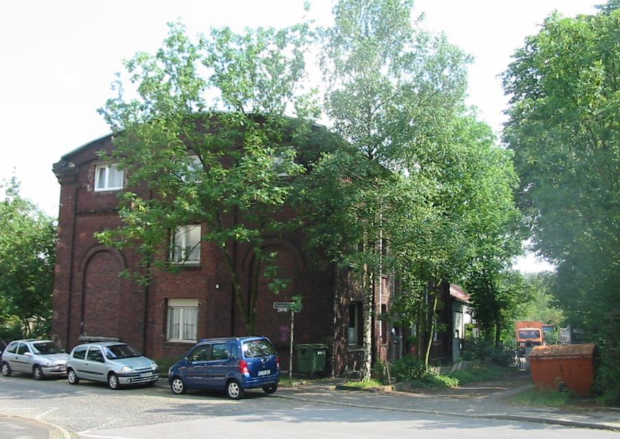 Bild von alten Fördermaschinenhaus der Zeche Dannenbaum II